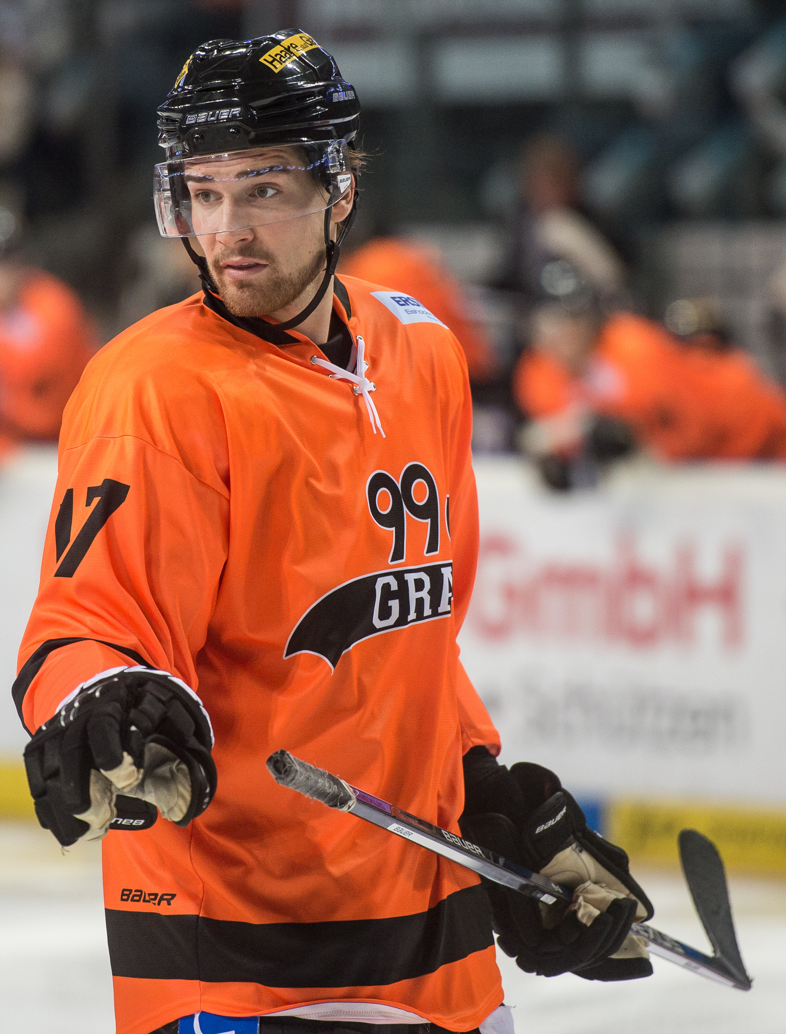 Arena Nürnberger Versicherungen,Eishockey,Mercedes-Benz Rent Cup 2015,Moser Medical Graz 99ers,Victor Panelin-Borg